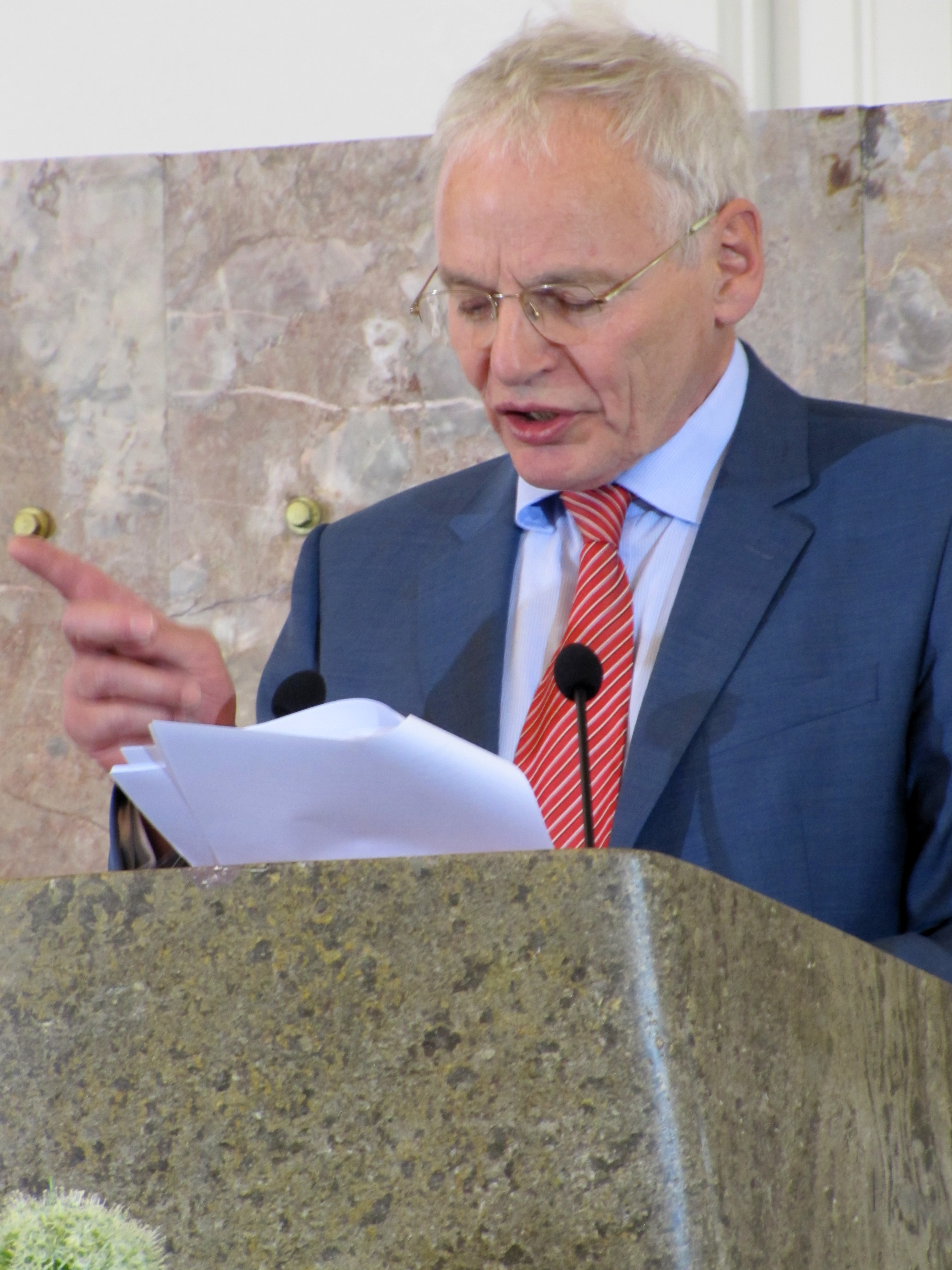 Goetz Aly (Preistraeger), 2012 in der Frankfurter Paulskirche zur Verleihung des Ludwig-Boerne-Preises.